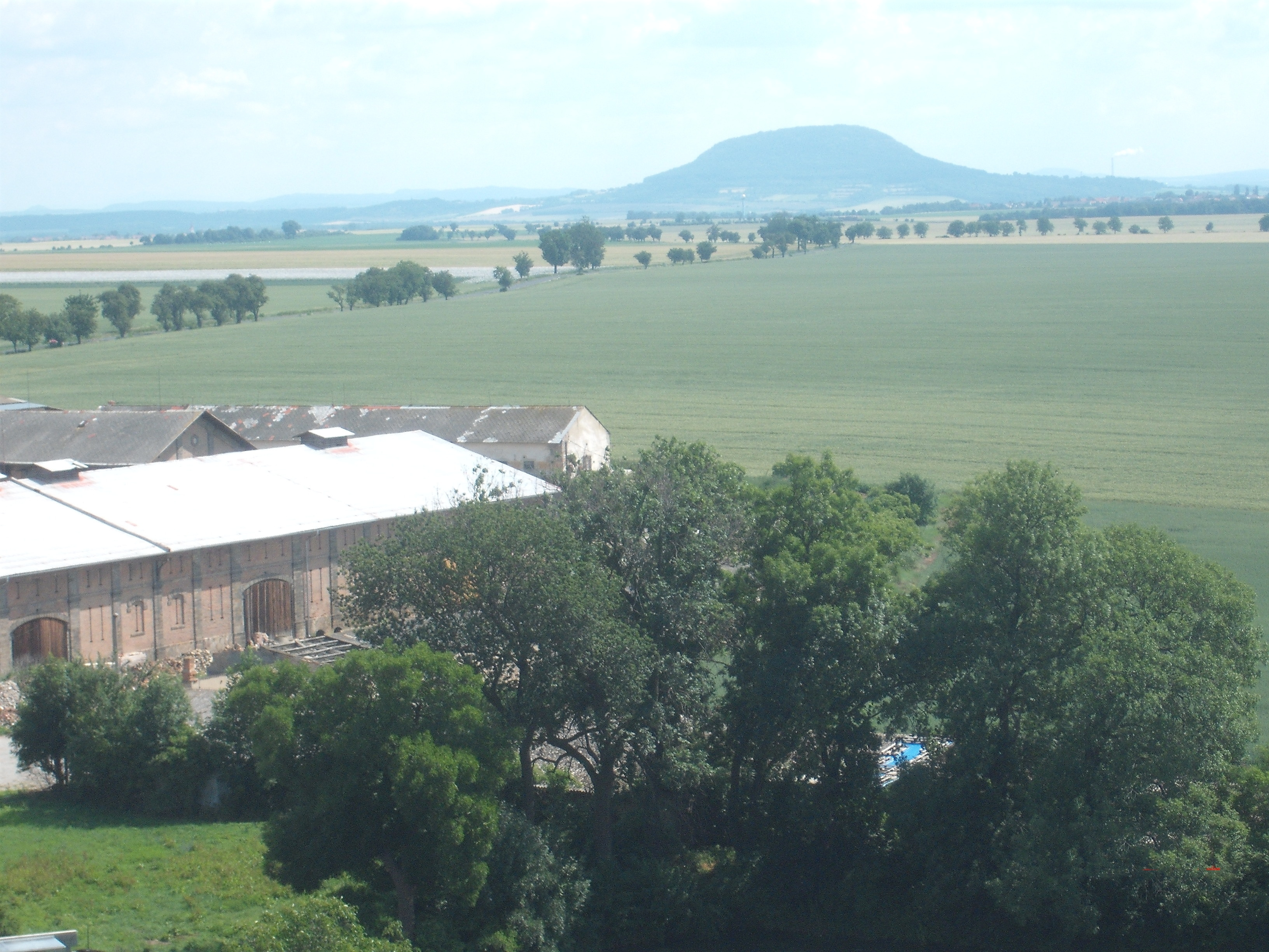 Pohled od Radešína vsv. směrem na horu Říp